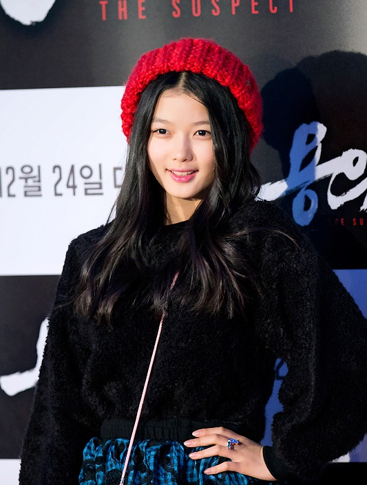 131217-용의자-VIP시사회김유정